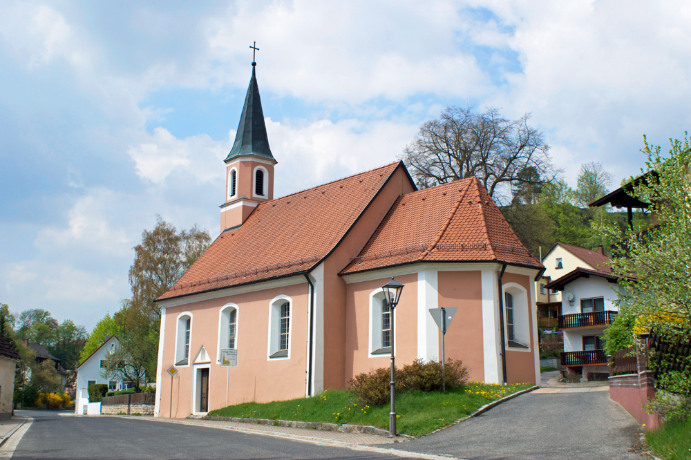 Katholische Nebenkirche St. Sebastian in Hohenfeld